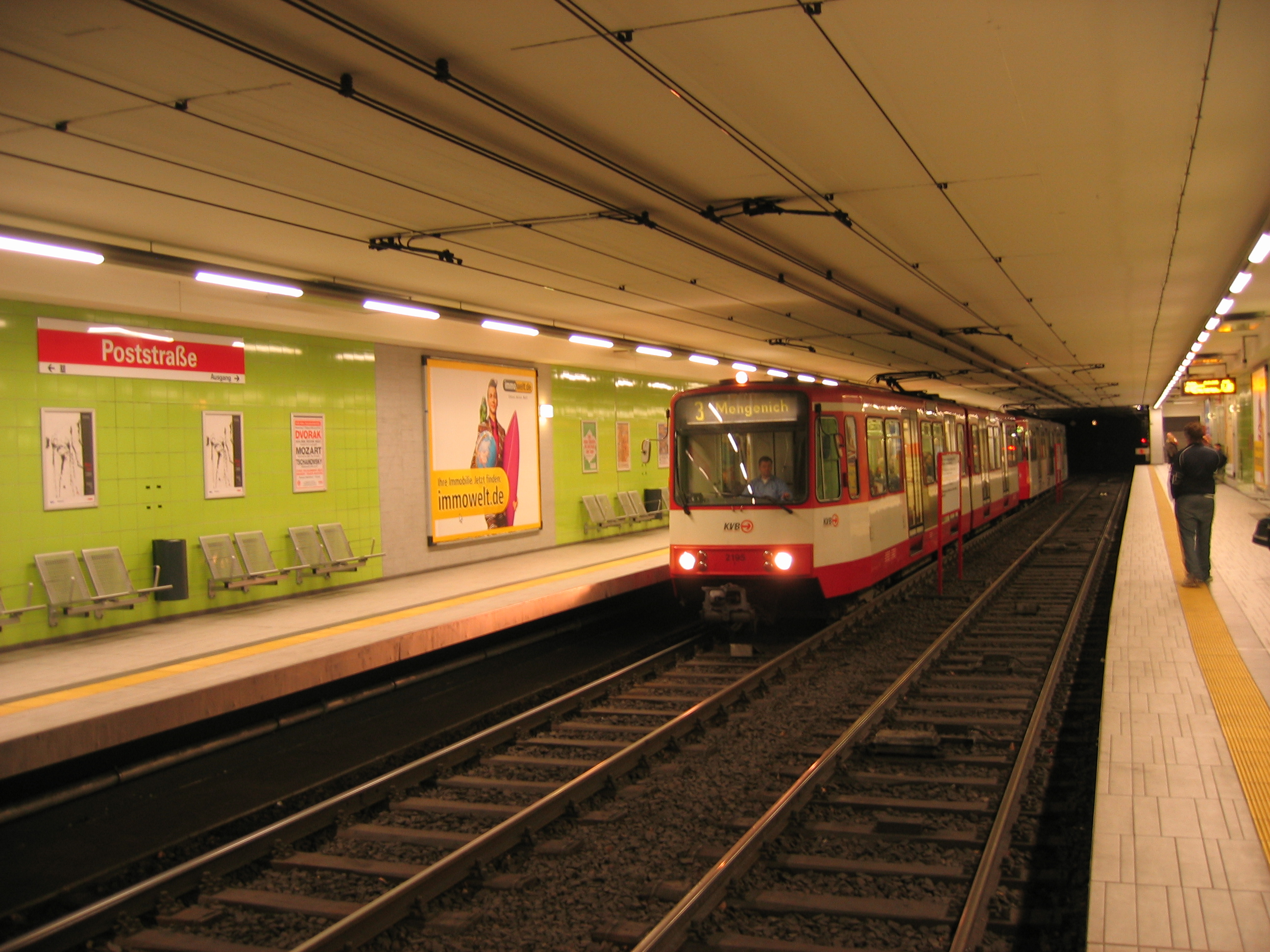 U-Bahn-Station Poststraße der Stadtbahn Köln